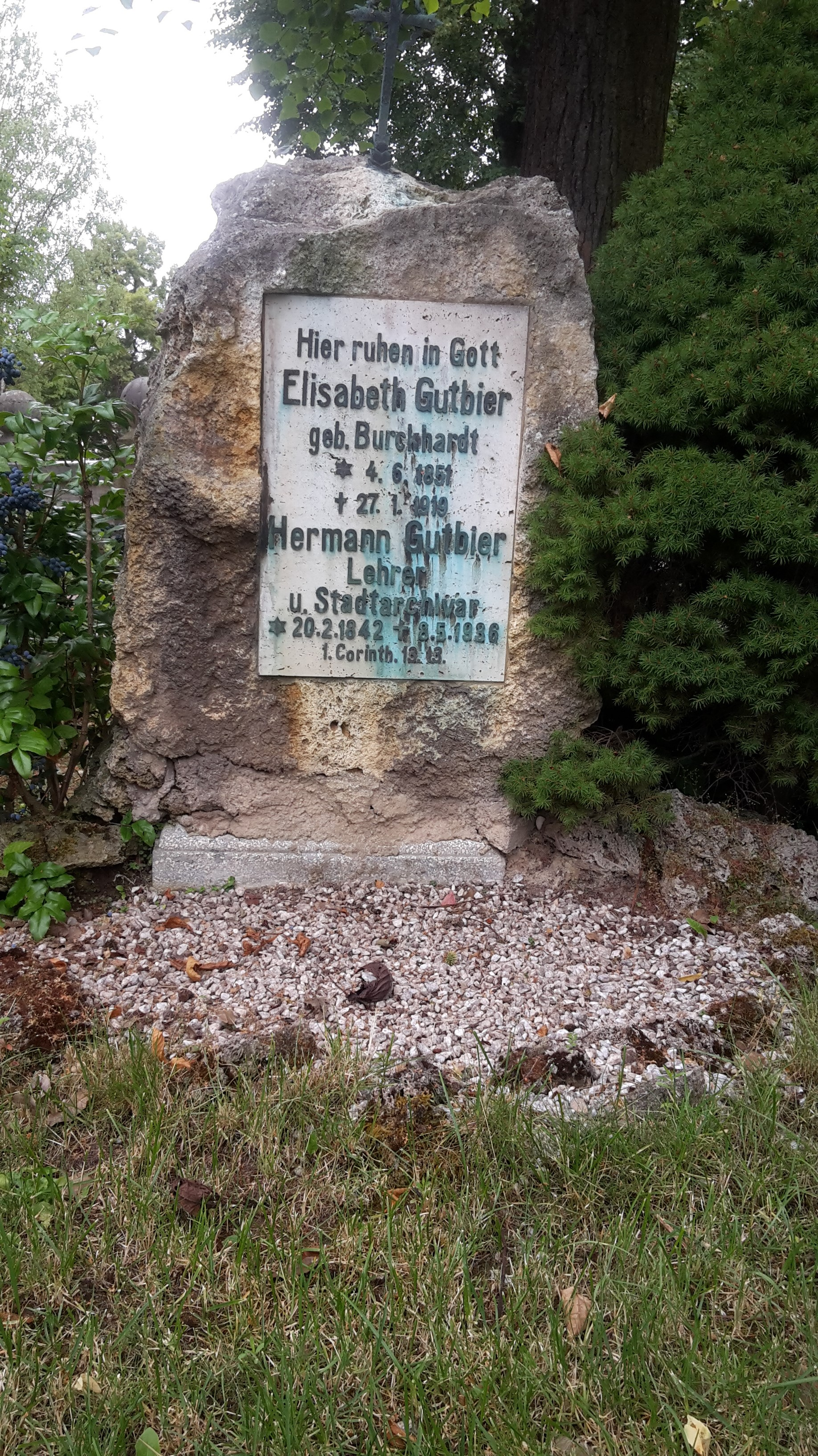 Das Grab von Hermann Gutbier und seiner Frau im Jahr 2019